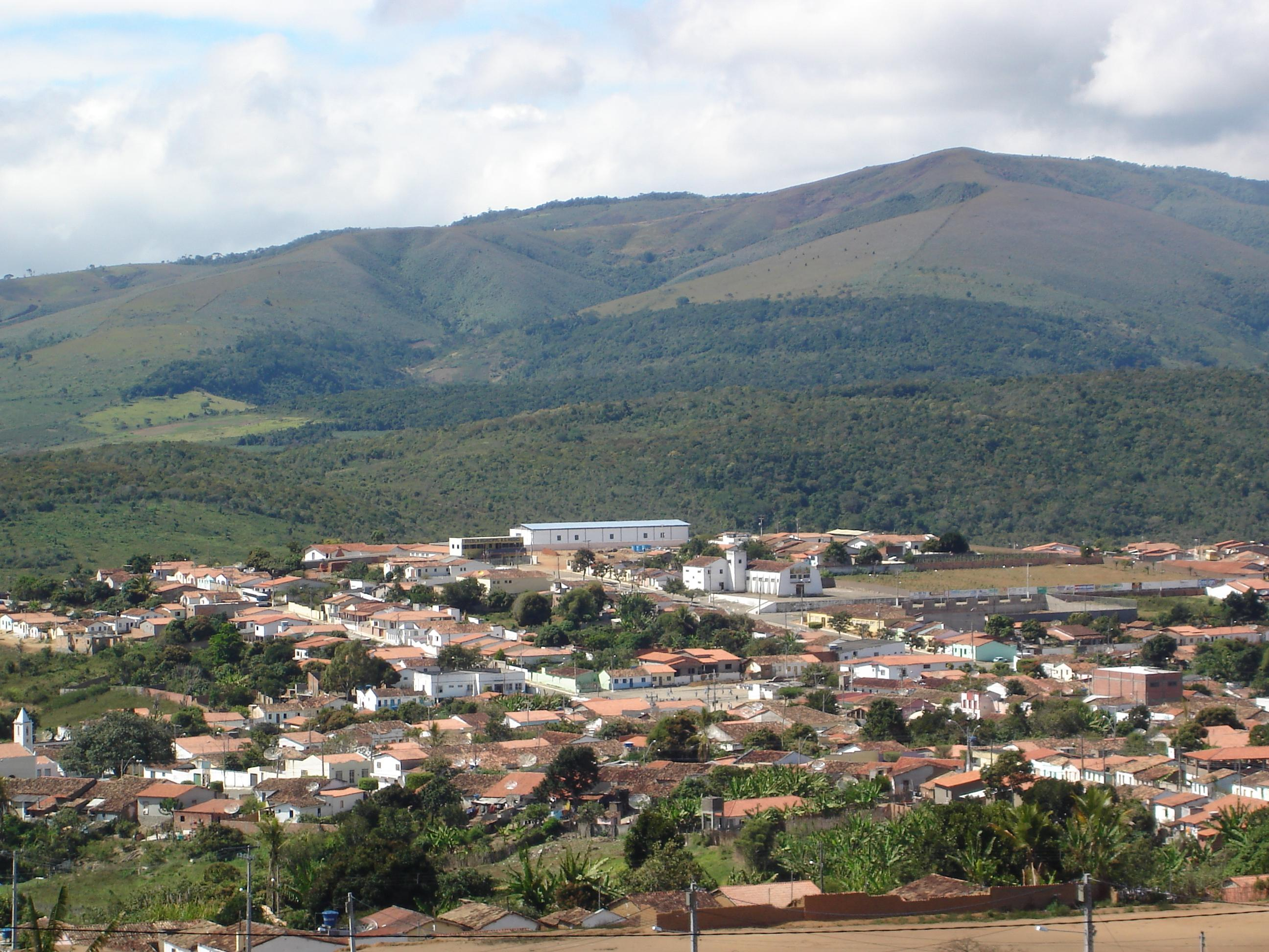 Vista da zona urbana da cidade do Cruzeirão